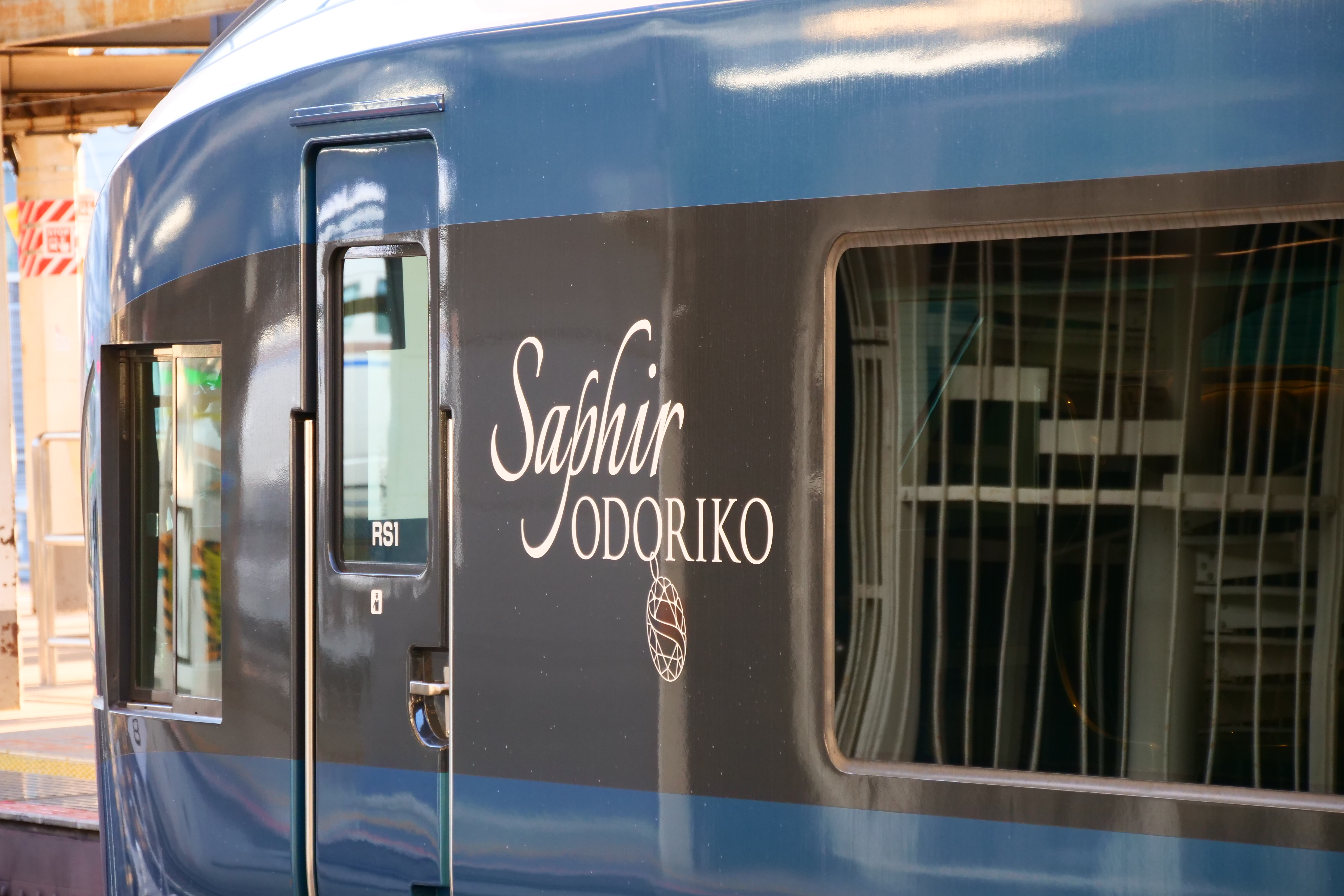 サフィール踊り子のロゴマーク 東京駅にて撮影